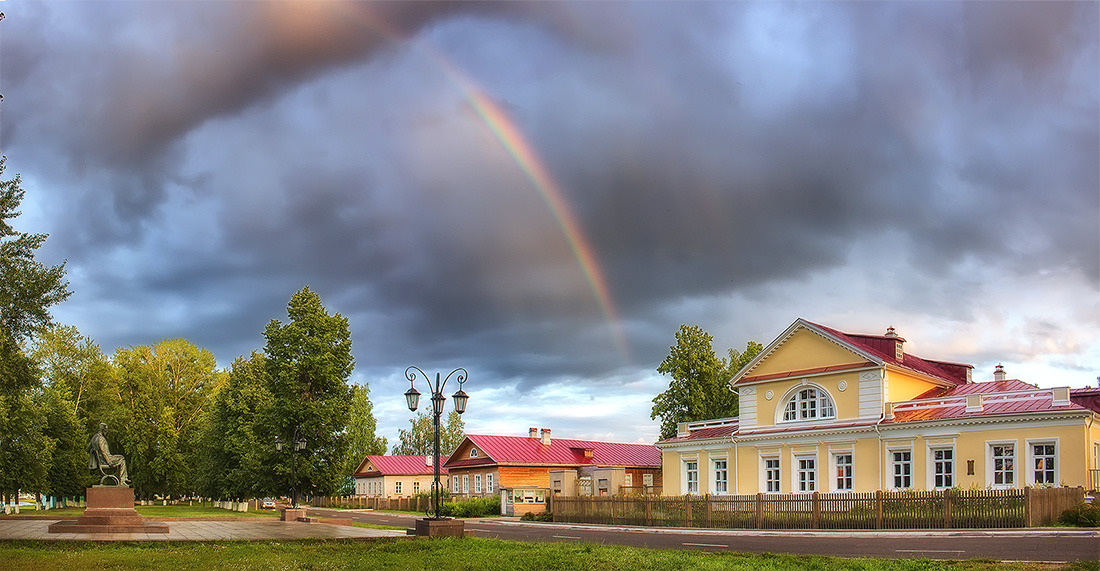 Дом горного начальника (дом, в котором родился П.И. Чайковский в 1840 году): улица Чайковского, 119, Воткинск, Удмуртия